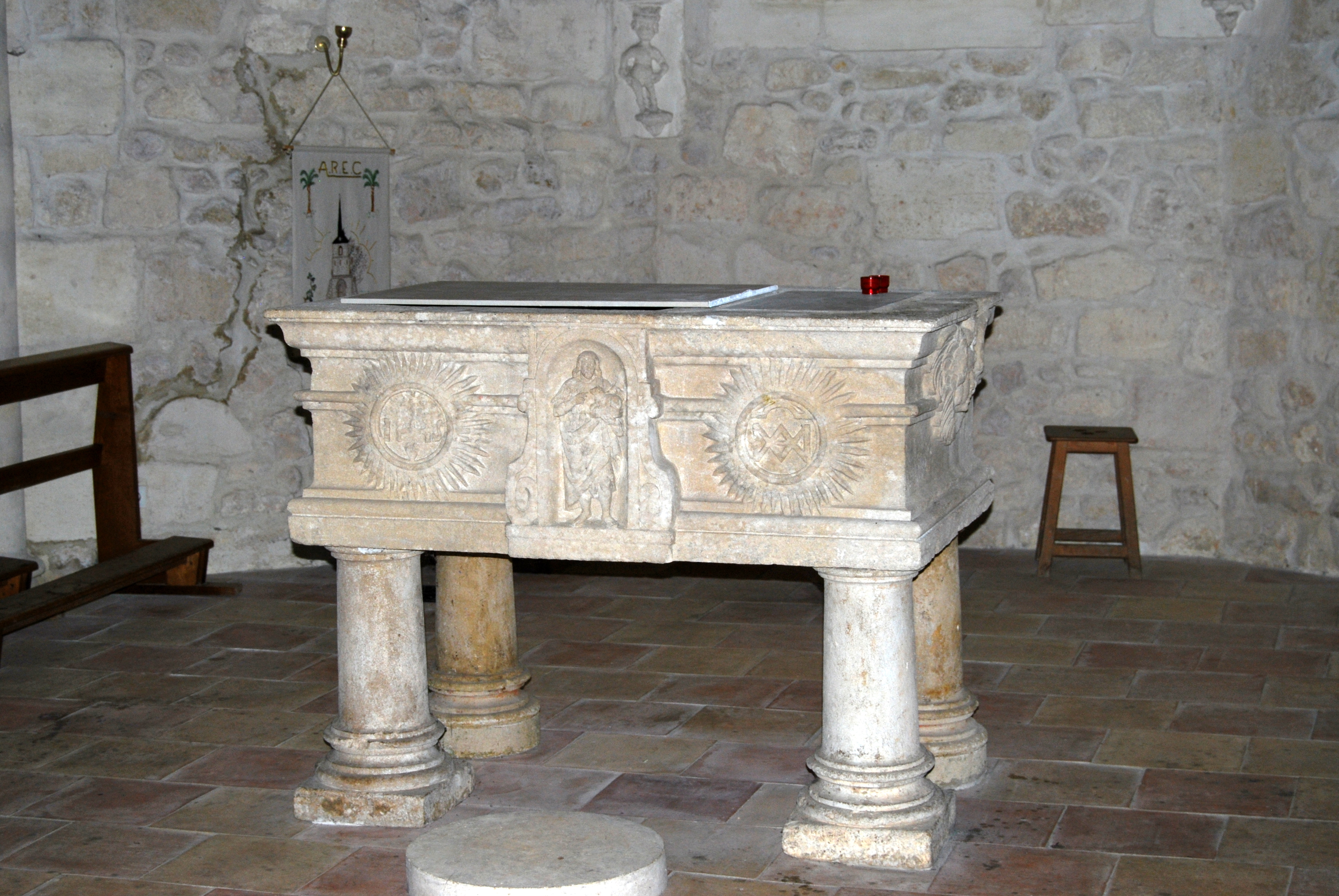 Église Saint-Martin de Carignan-de-Bordeaux